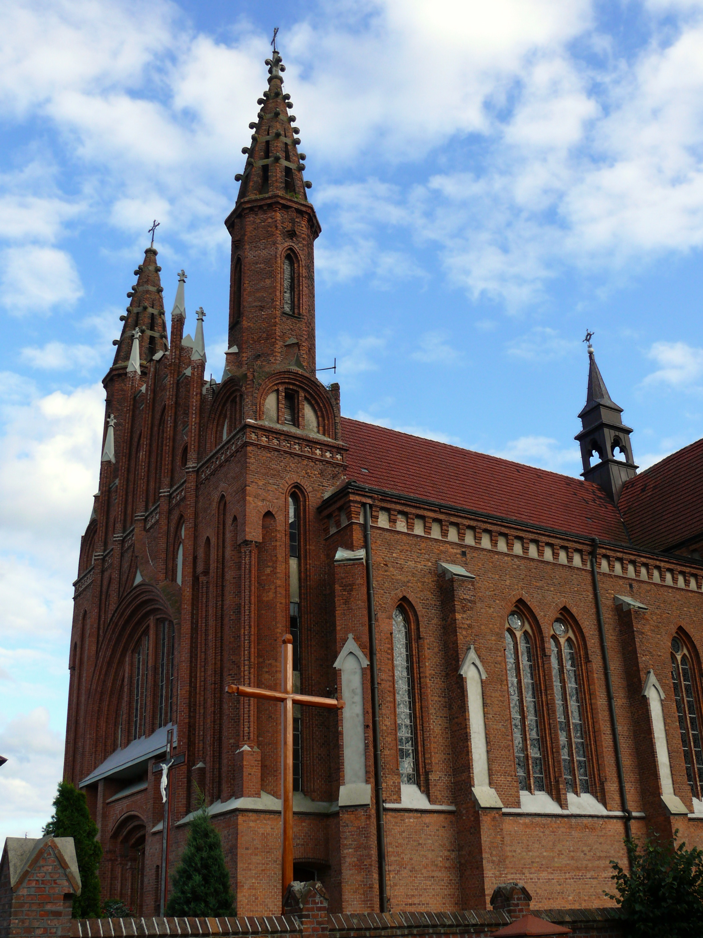 Fasada kościoła Świętej Rodziny w Przedczu